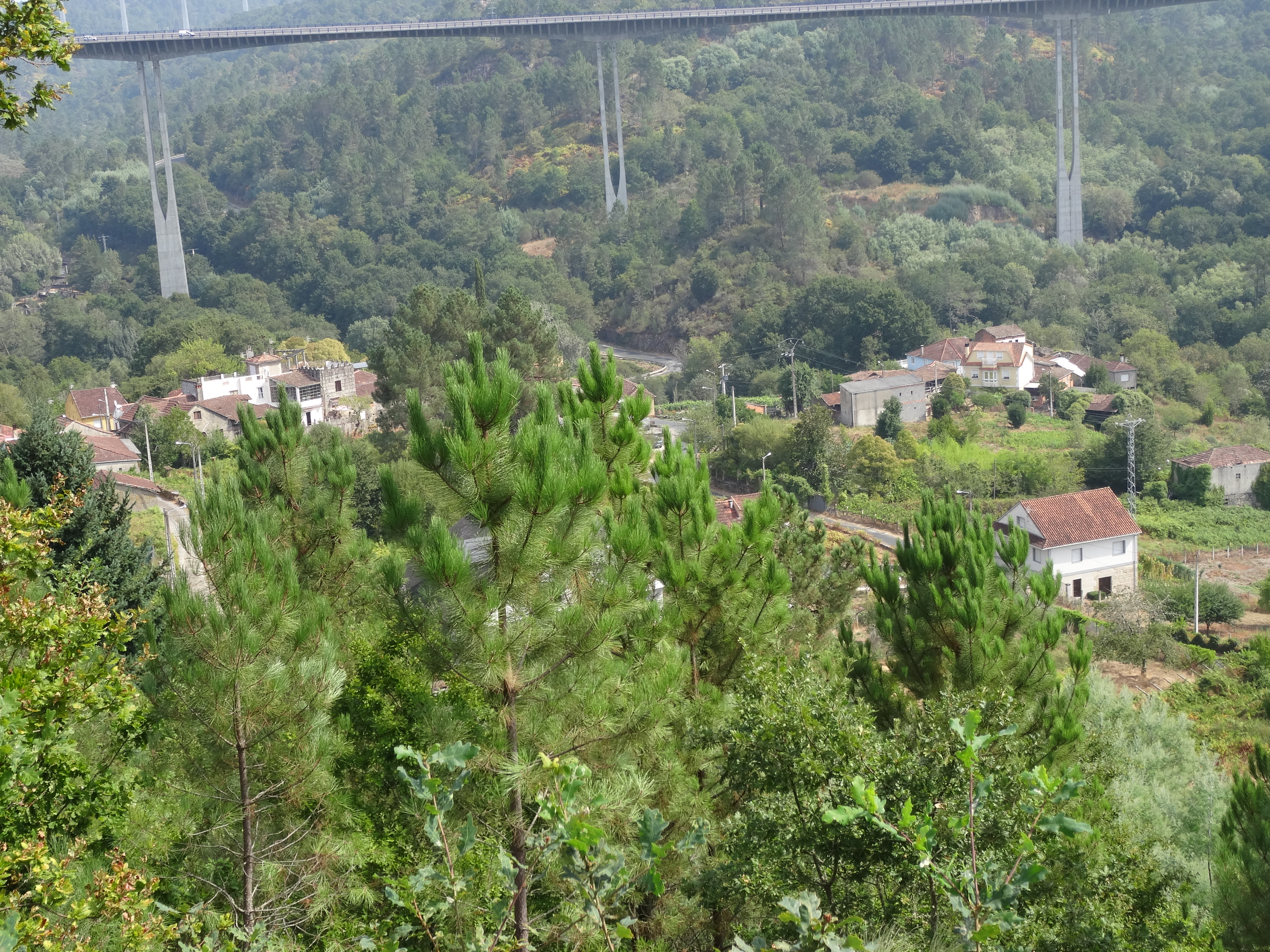 Ver título.